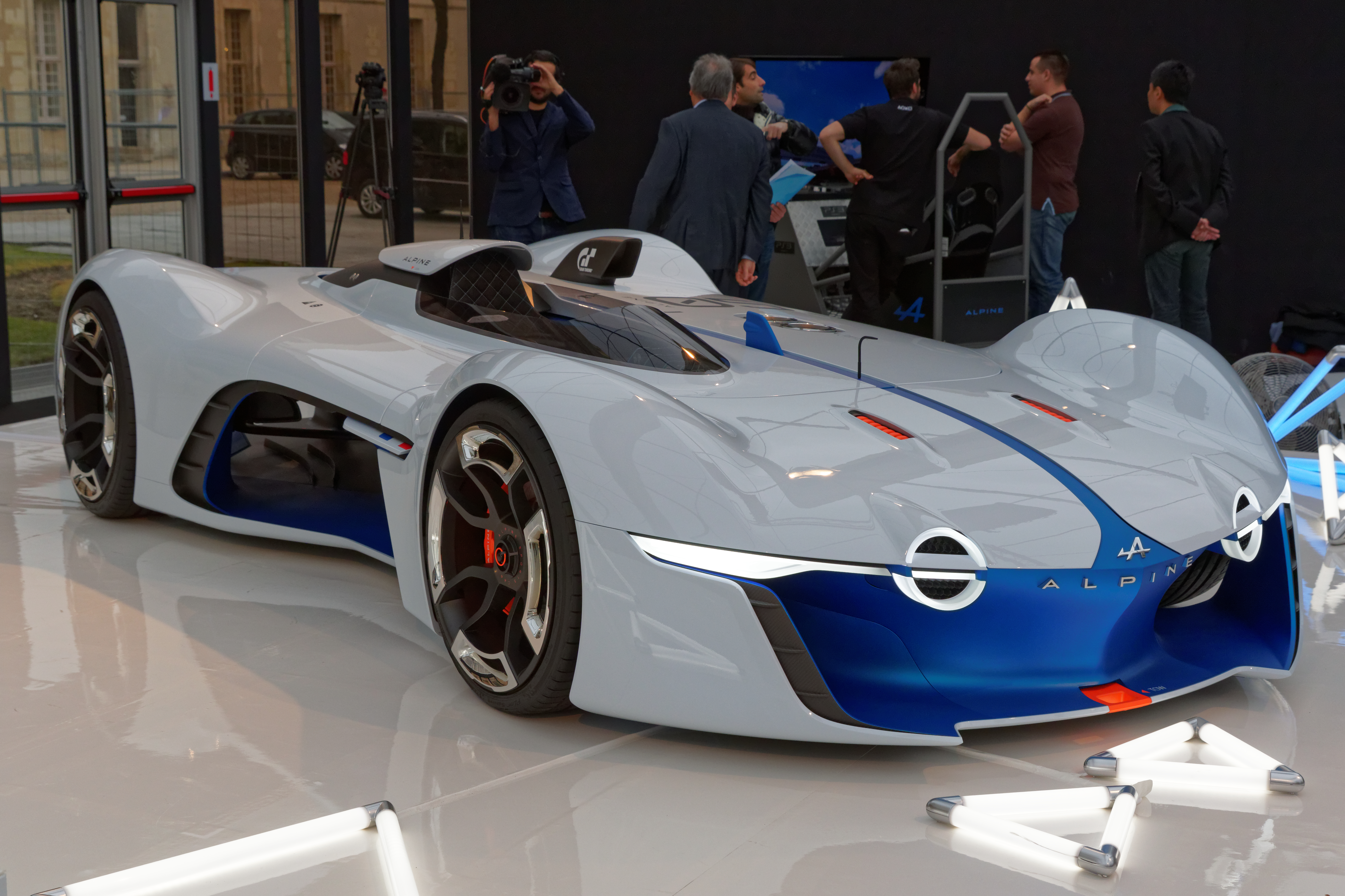 L'Alpine Vision Gran Turismo exposée lors du festival automobile international 2015.